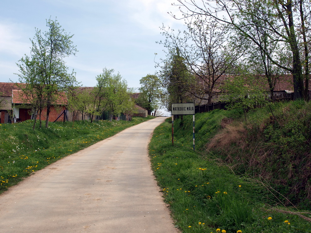 Ulaz u selo Matković Mala, Brodsko-posavska županija.